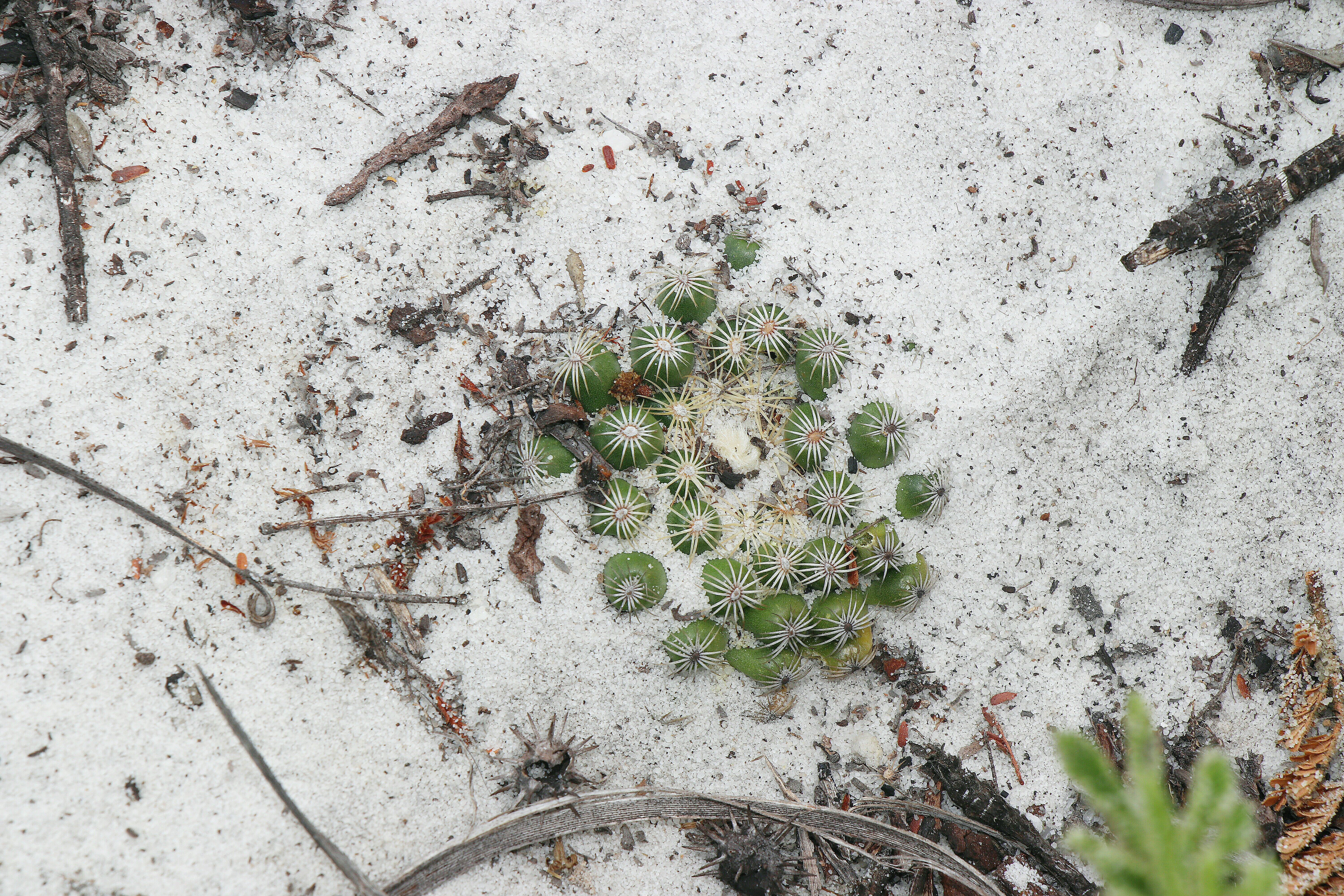 Discocactus zehntneri ssp. buenekeri am Typstandort, Bahia, Brasilien